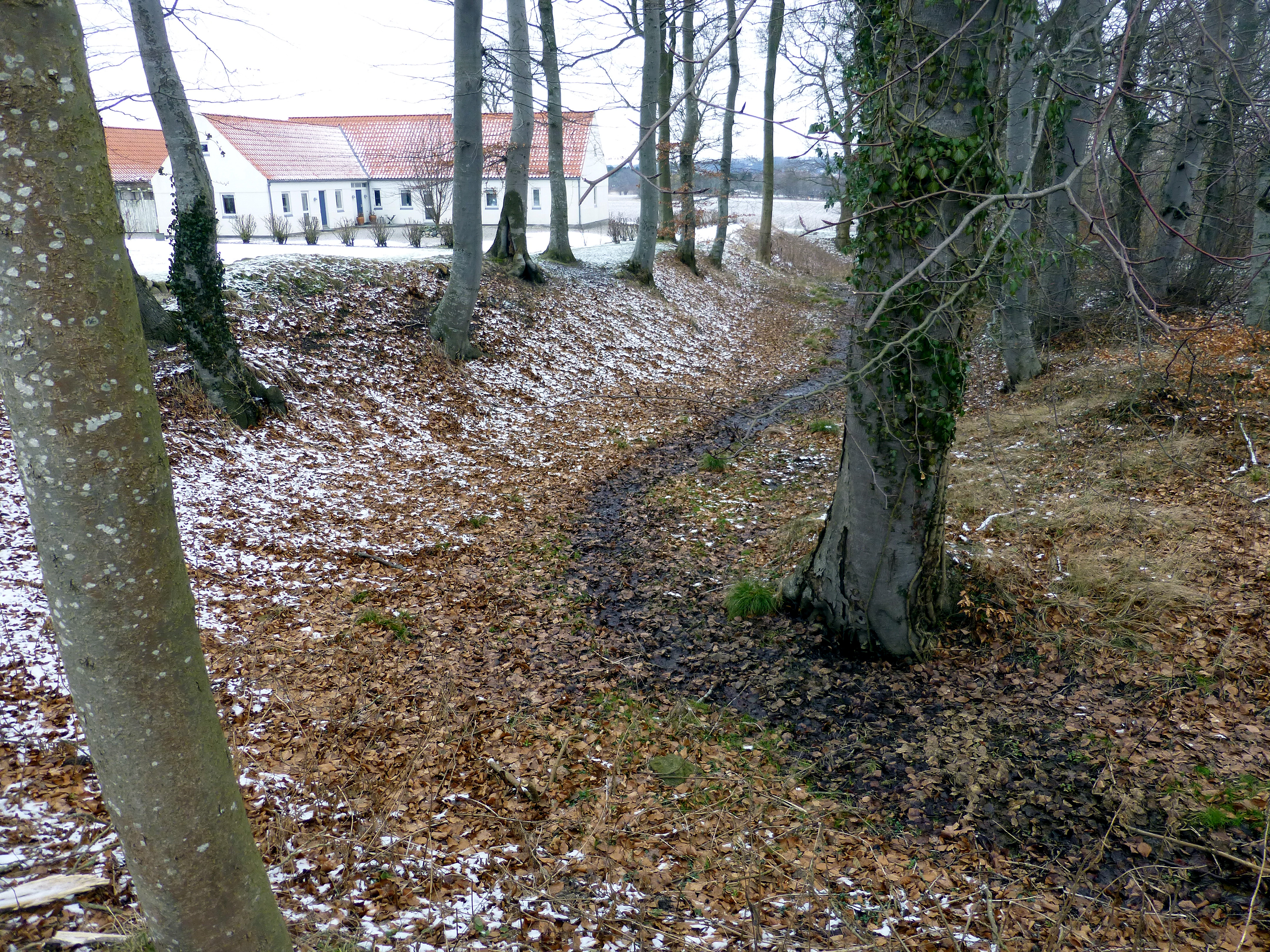 Bådstedgård eller Bodstedgaard. Østvolden st mod nord